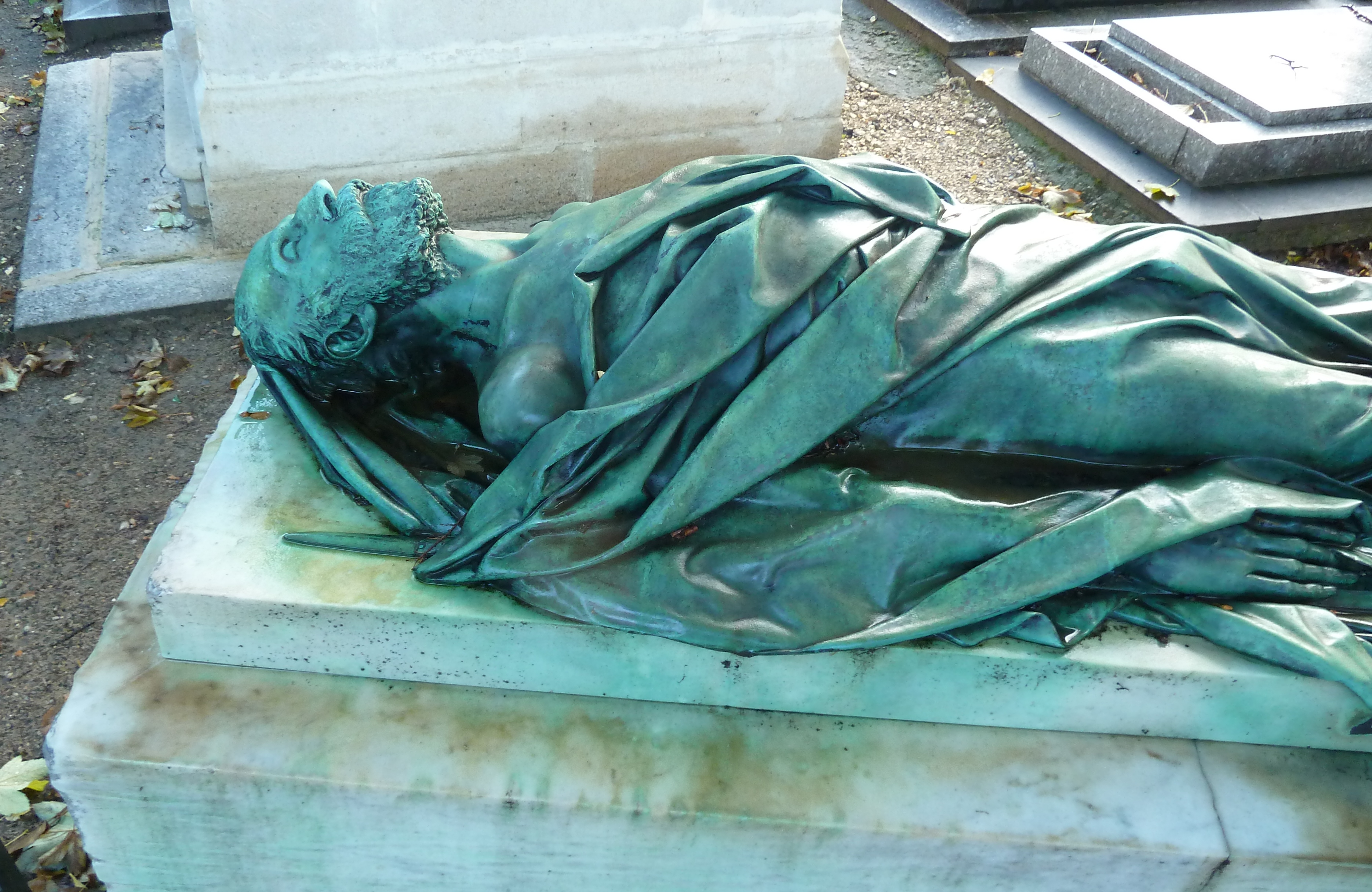 Gisant en bronze de Godefroi Cavaignac, du sculpteur François Rude. Cimetière de Montmartre